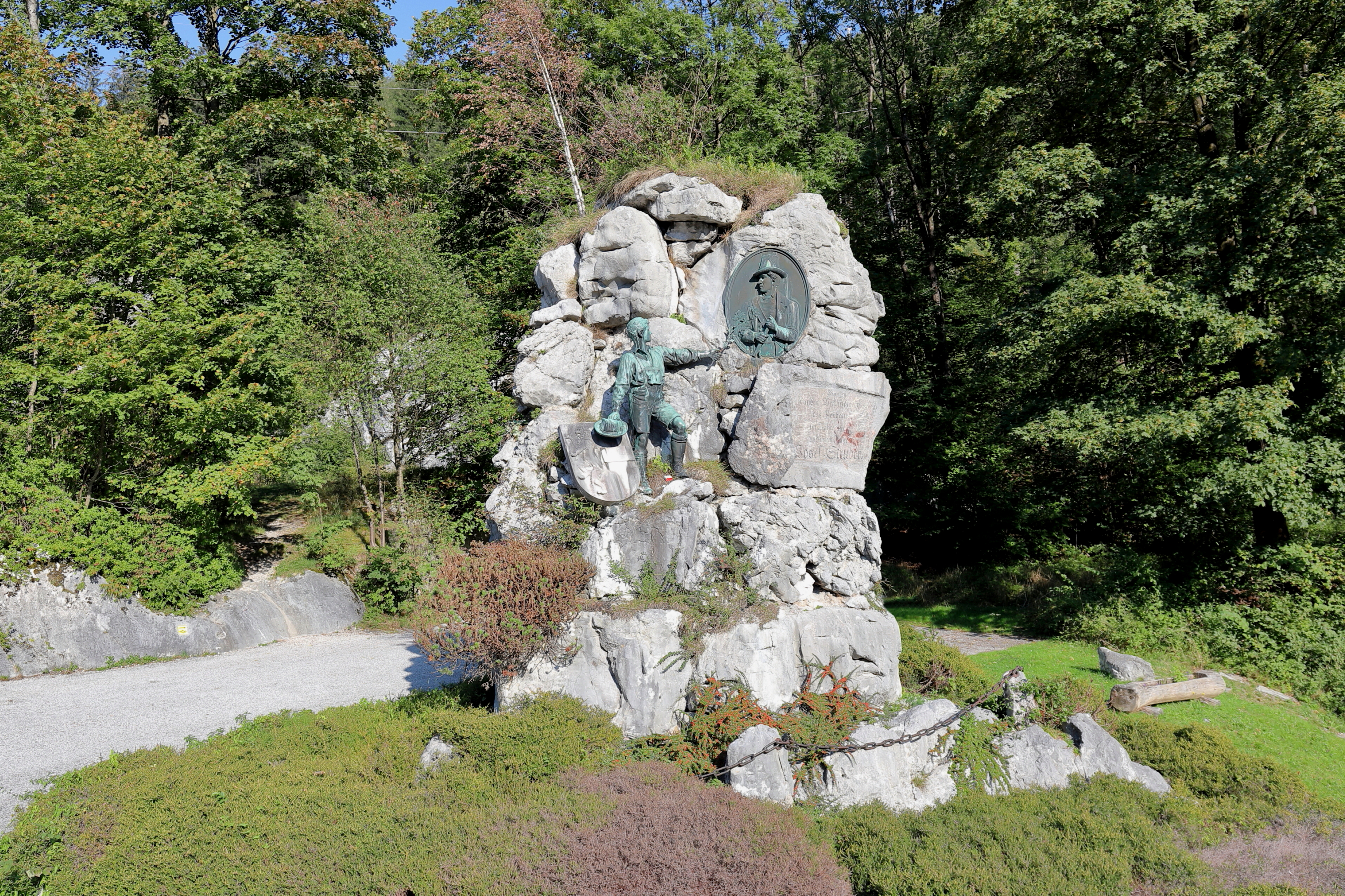 Das Struber-Denkmal auf der Anhöhe des Pass Lueg in der Salzburger Gemeinde Golling an der Salzach.Das Denkmal wurde vom Bildhauer und Schulleiter Hubert Spannring 1898 zu Ehren des Salzburger Freiheitskämpfers Joseph Struber errichtet. Die Inschrift lautet: Den Landesvertheidigern des Pongaues im Jahre 1809 und ihrem Anführer Josef Struber.